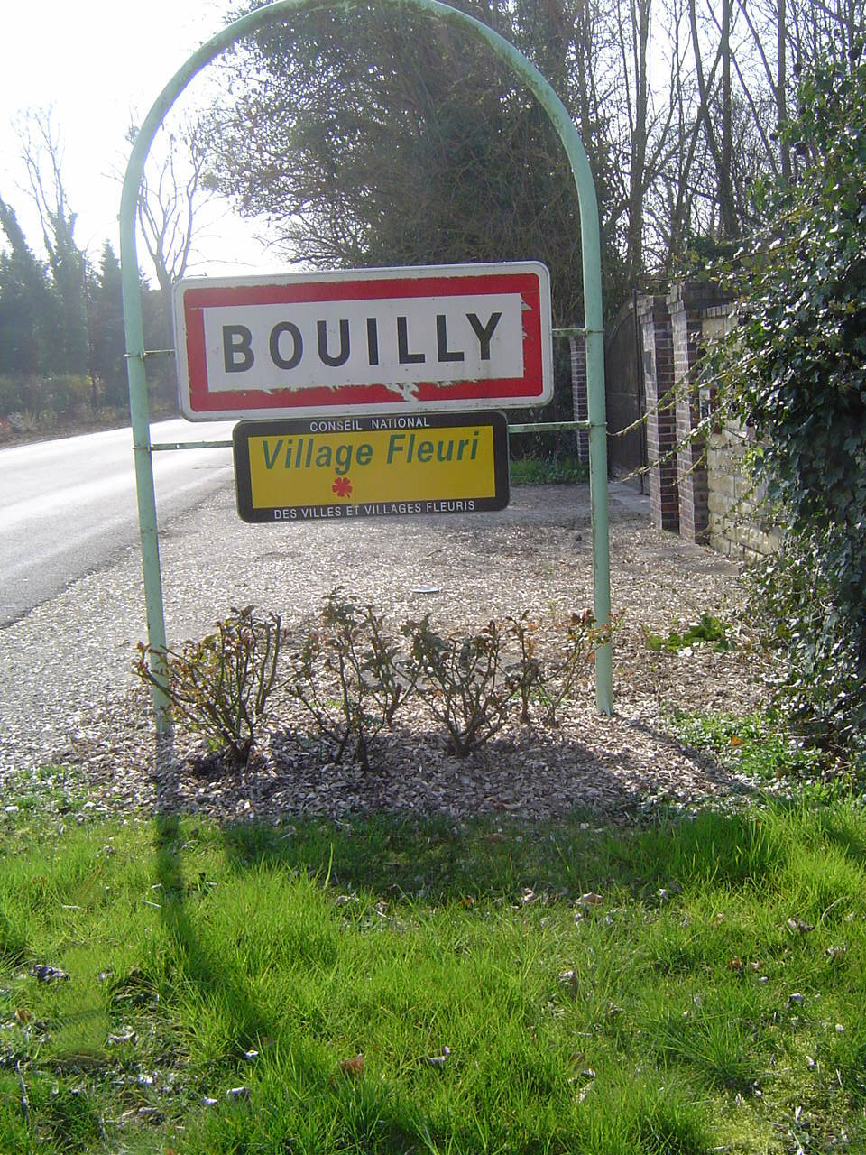 Bouilly - panneau à l'entrée du village